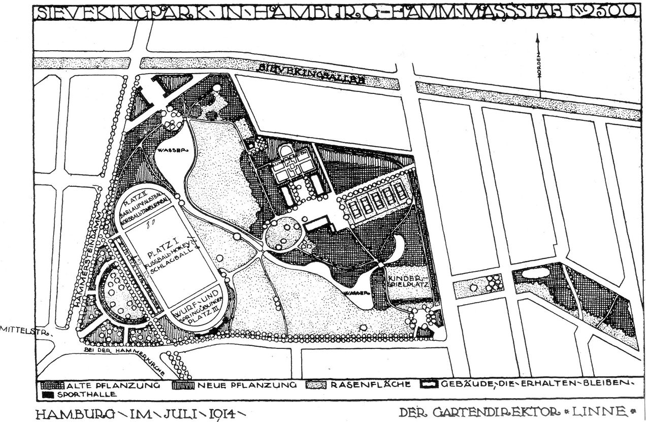 Plan zur Umgestaltung des ehemaligen Sieveking-Parks (heute Hammer Park) in Hamburg-Hamm.